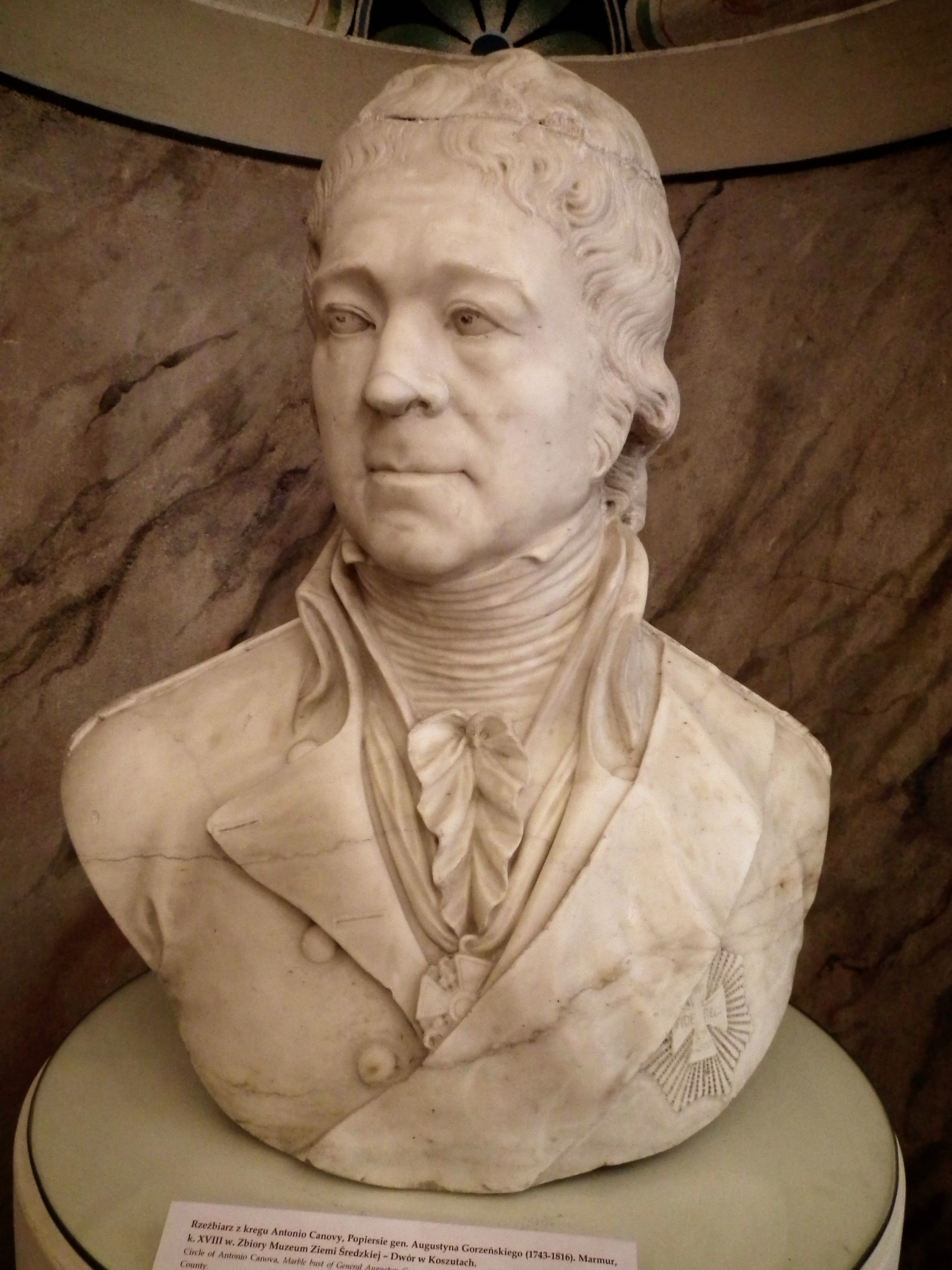 "Augustyn Gorzeński", krąg Antonio Canovy. Muz. Dobrzyca. XVIII w.